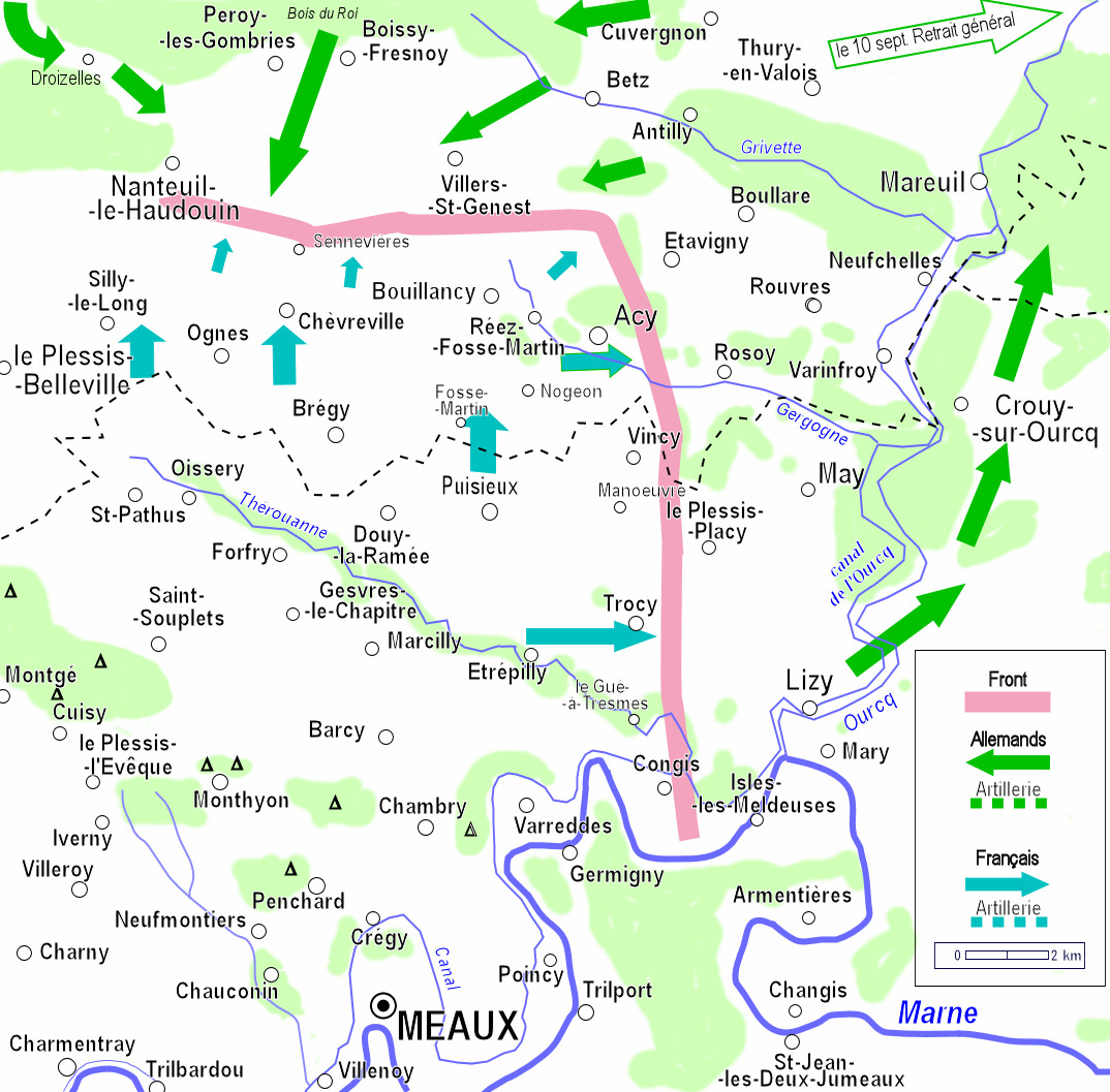 Ligne de front au 9 septembre